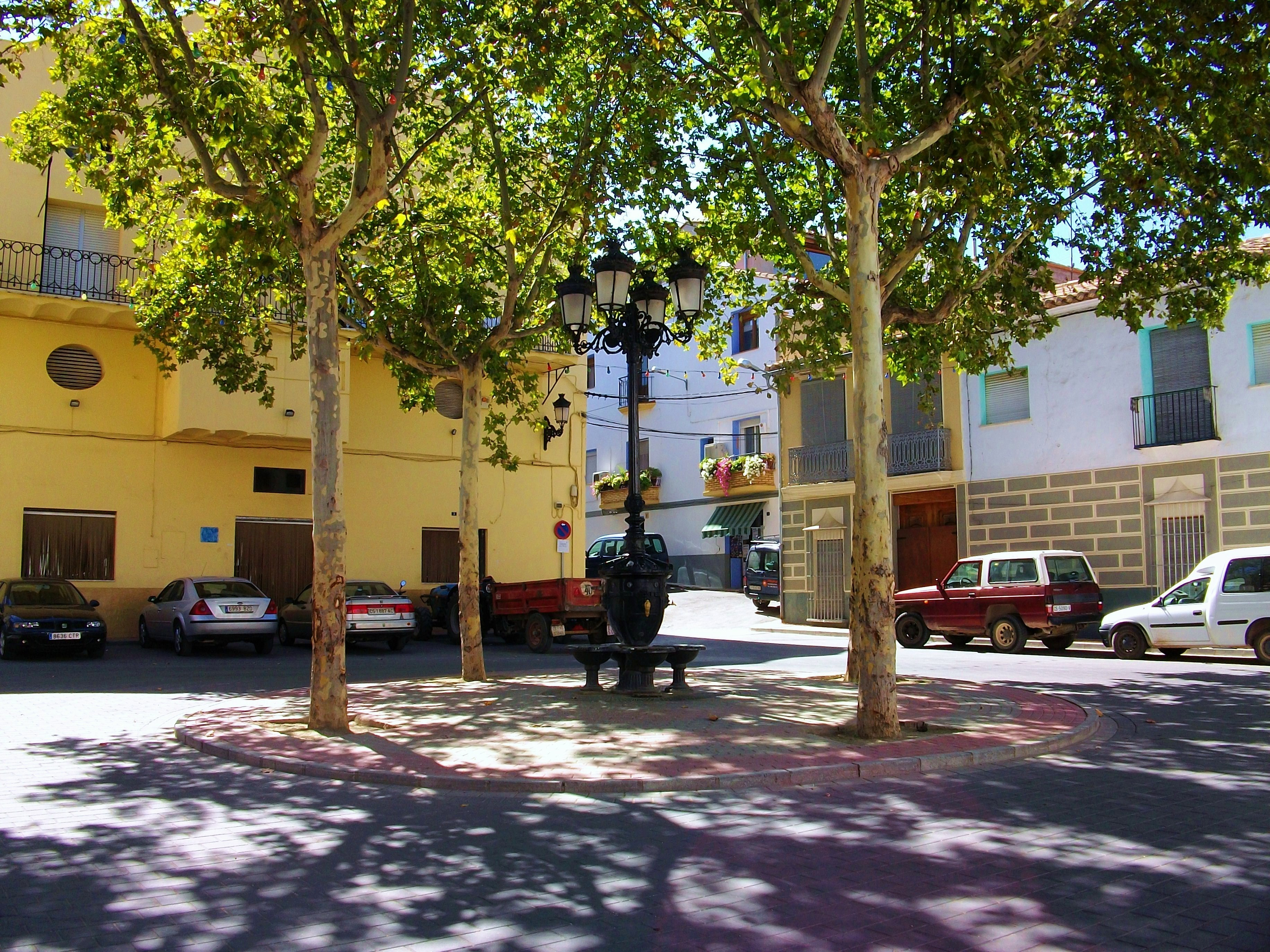 Plaça del Mesó de Soneixa, Alt Palància.